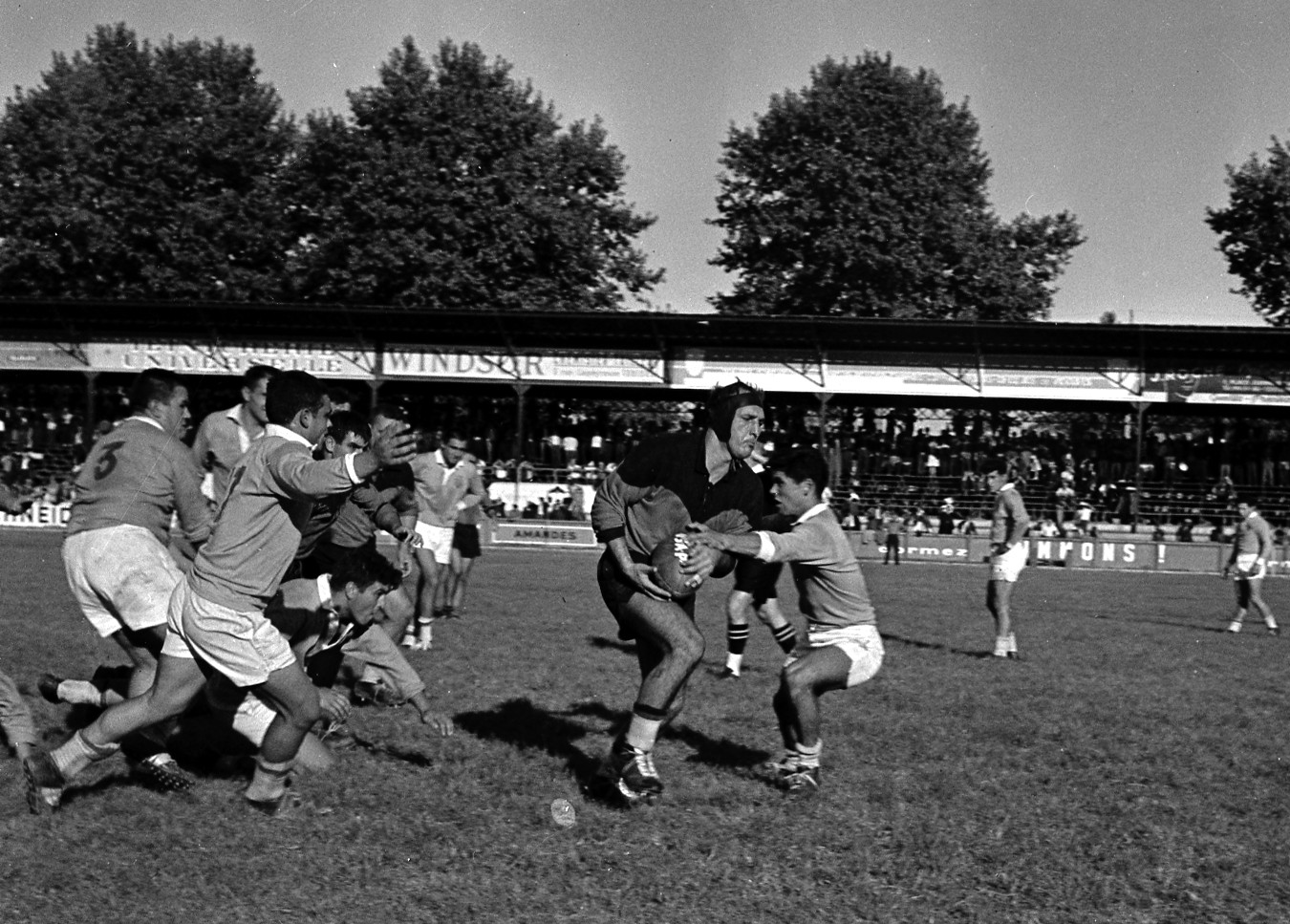 Stade Ernest Wallon. Le 23 Septembre 1962. Vue d'une phase de jeu entre le Stade Toulousain et l'USAP.